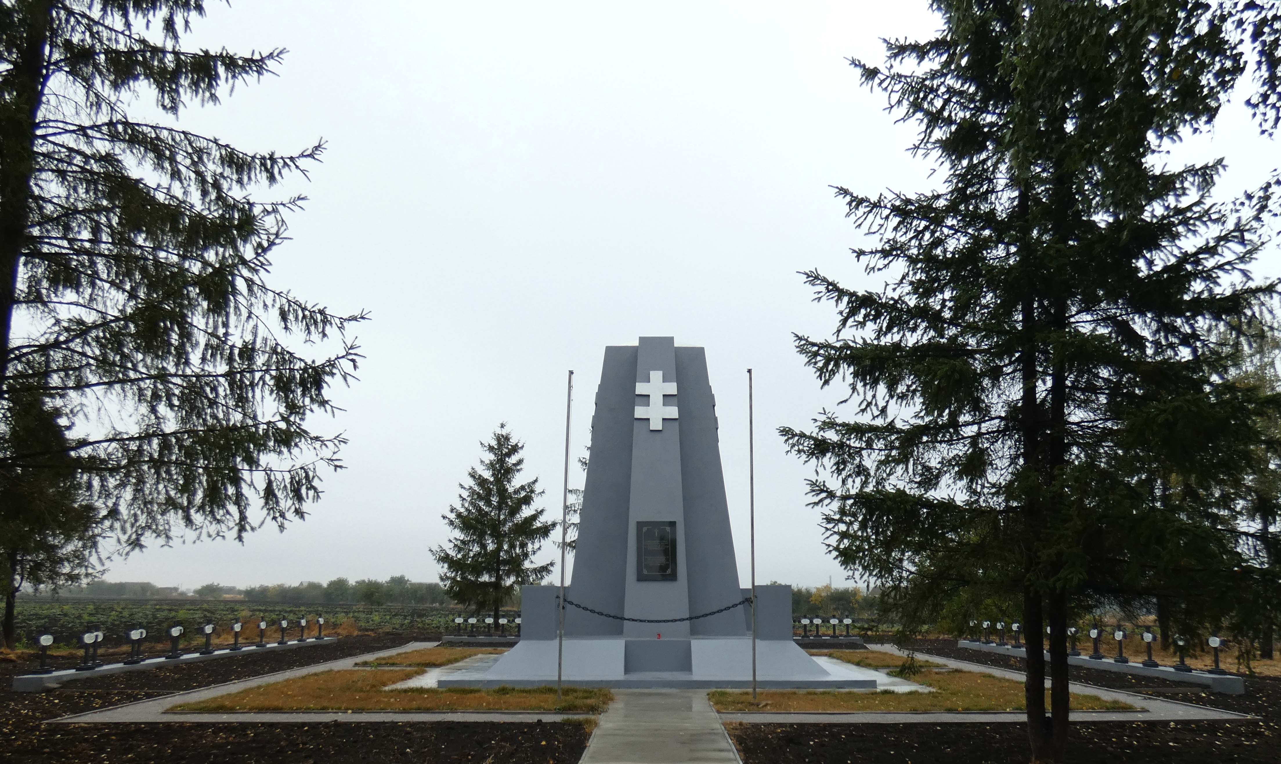 Братська могила словацьких солдатів, загиблих під час наступу, Липовець, при в'їзді в місто з півдня по дорозі Вінниця — Липовець, на полі